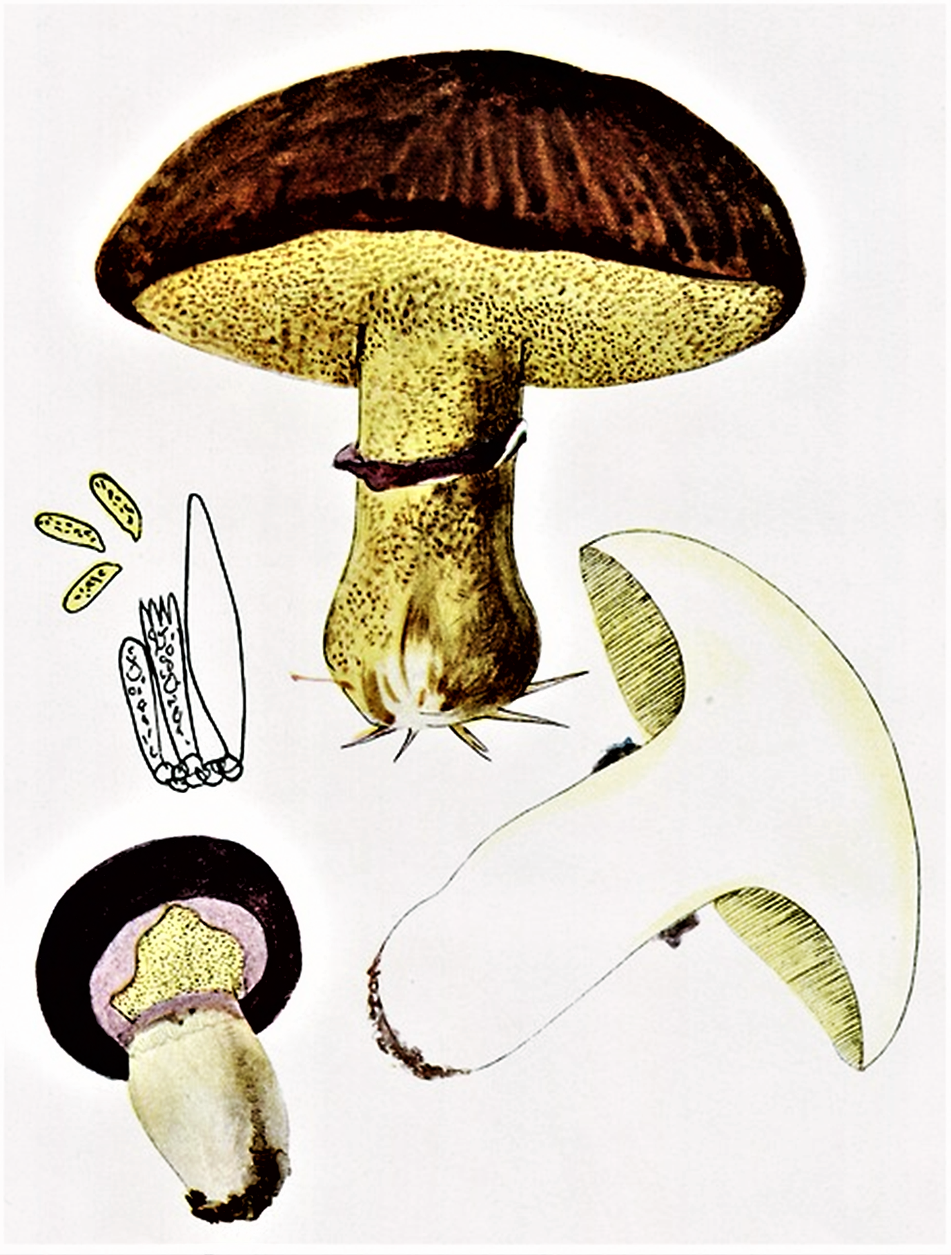 Giacomo Bresadola: Boletus luteus (L., 1753 ex Roussel (1796)